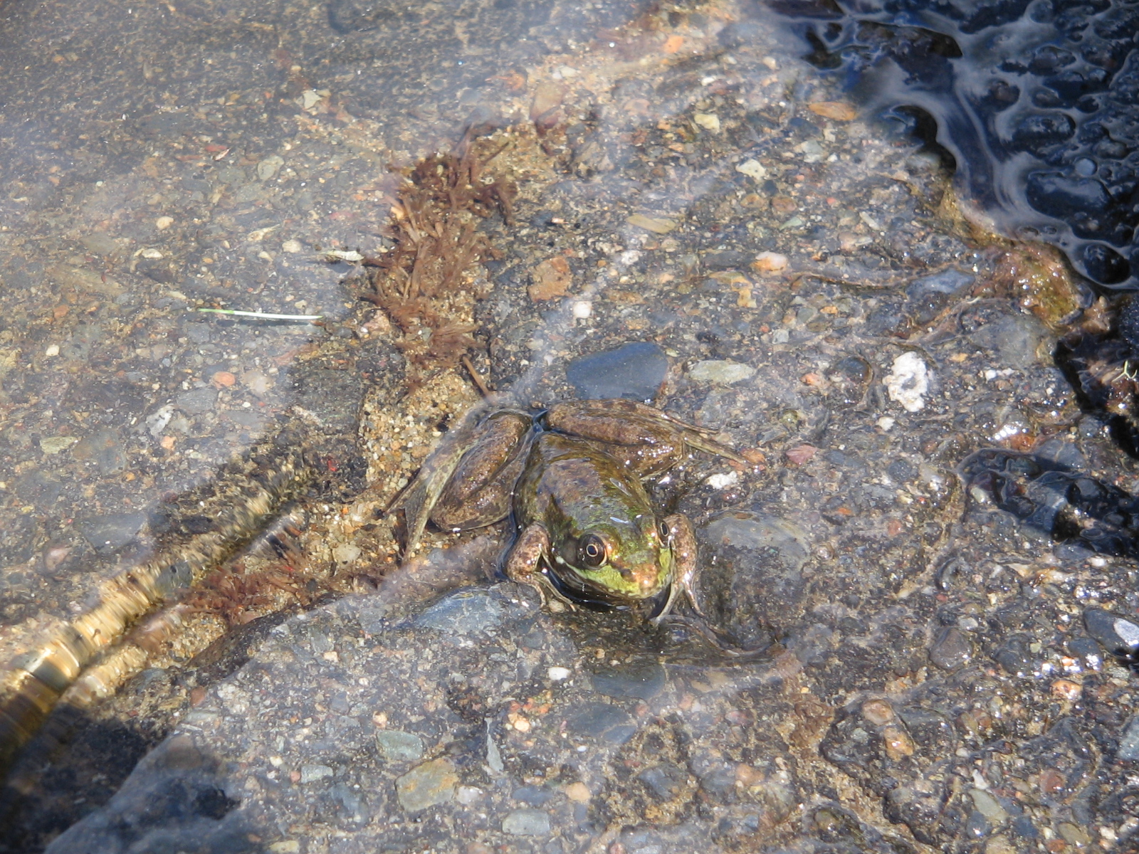 Grenouille verte (Lithobates clamitans) dans le lac Kejimkujik dans le parc national Kejimkujik